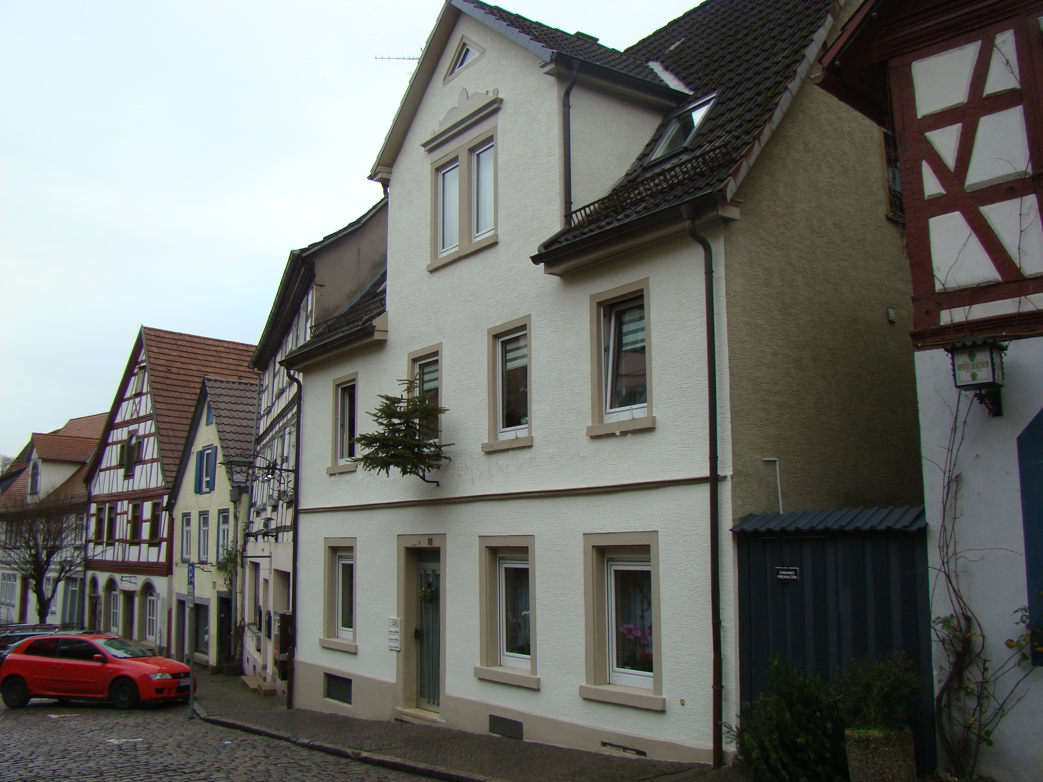 Hauptstraße 11 (Bad Wimpfen)